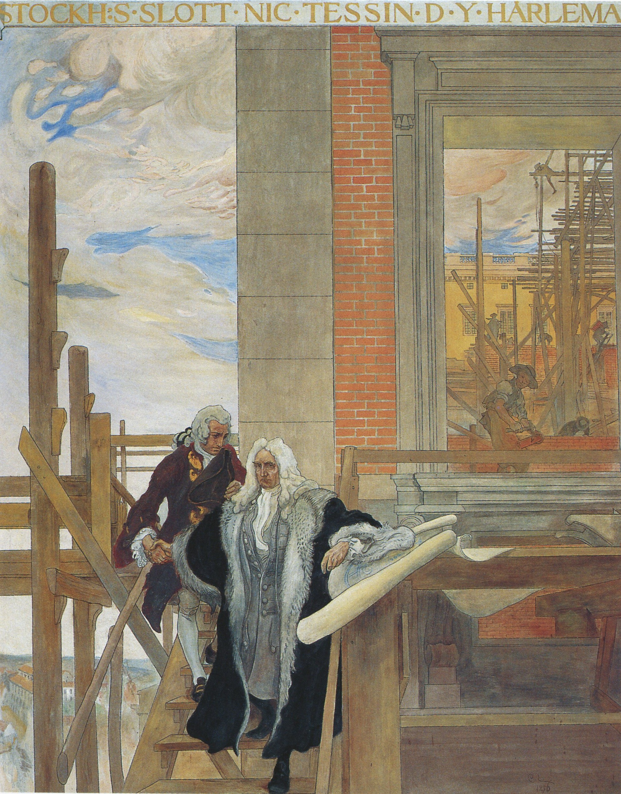 En av Nationalmuseifreskerna visande Slottsbygget för Stockholms slott med arkitekterna Nicodemus Tessin d.y. (nederst) och Carl Hårleman